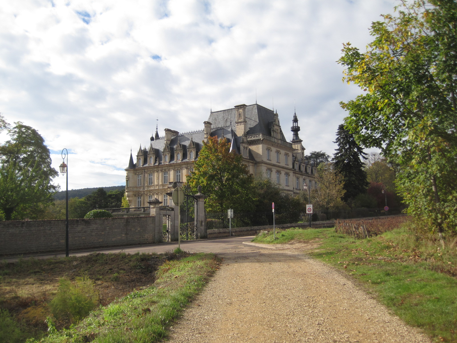 Château de Brochon